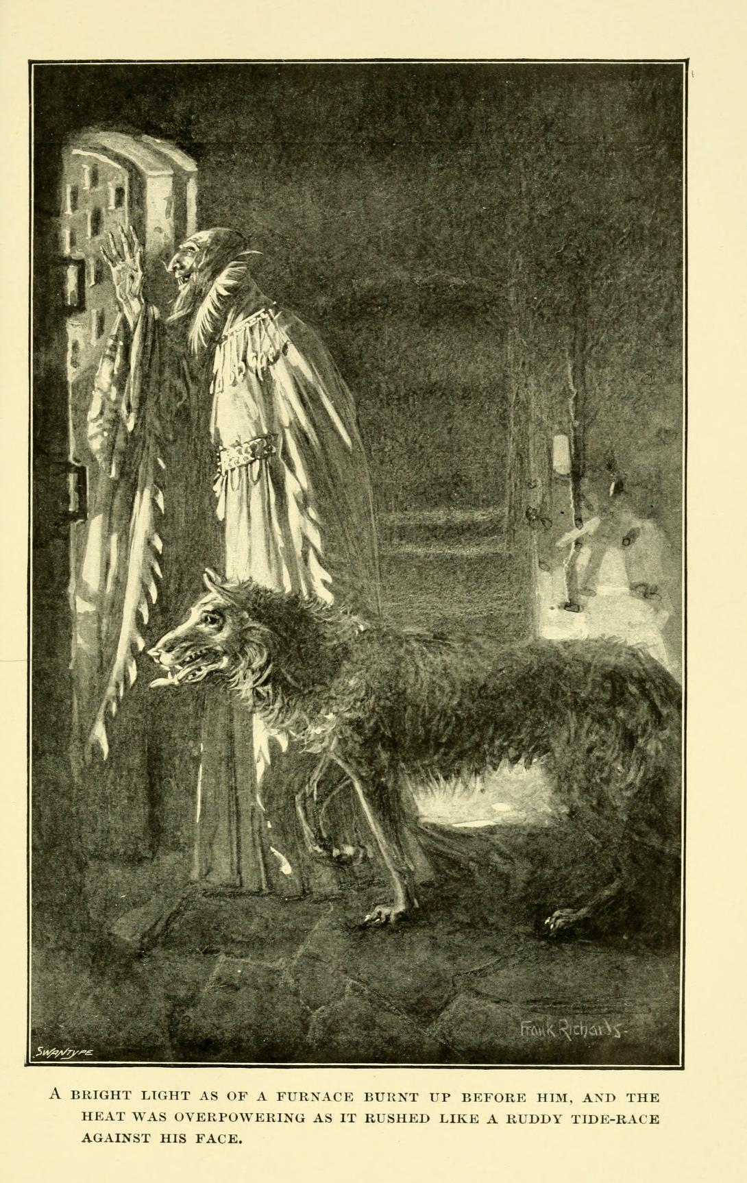 Gilles de Retz et la louve Astarté ; illustration de Frank Richards pour le roman The Black Douglas (1899) de S. R. Crockett.